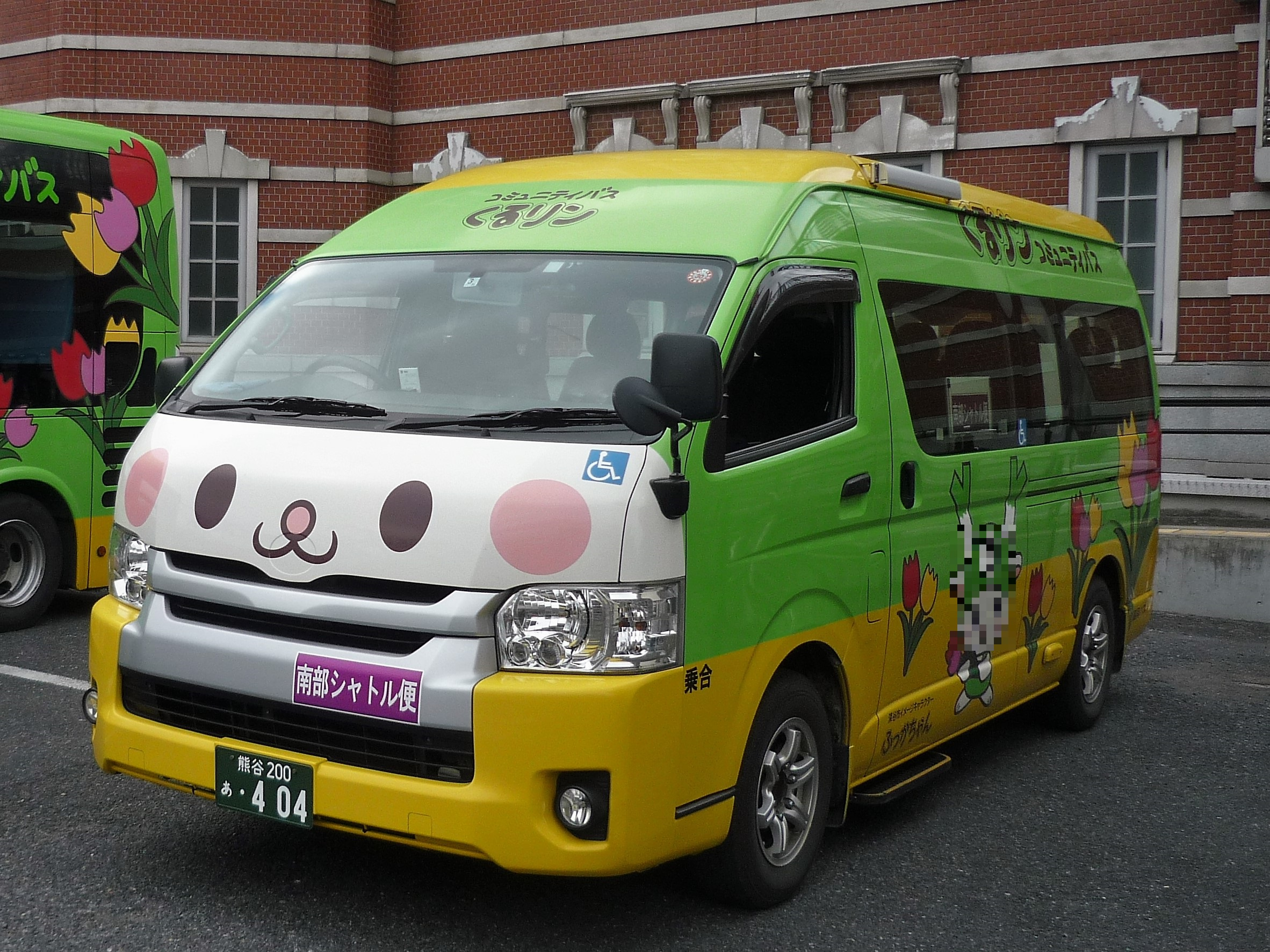 深谷市コミュニティバス「くるリン」南部シャトル便（深谷駅南口） Panasonic Lumix DMC-FS3